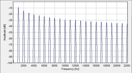 Spektrum der Oberwellen einer Sägezahnschwingung mit 1000 Hz